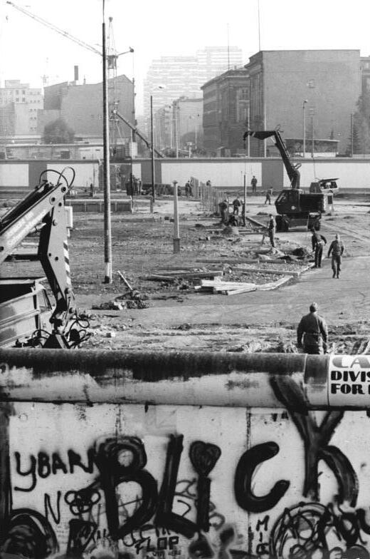 ADN-ZB-Grimm-11.11.89- Berlin: Zur Unterstützung des Reiseverkehrs nach Berlin (West) wird auch der Grenzübergang am Potsdamer Platz eingerichtet.